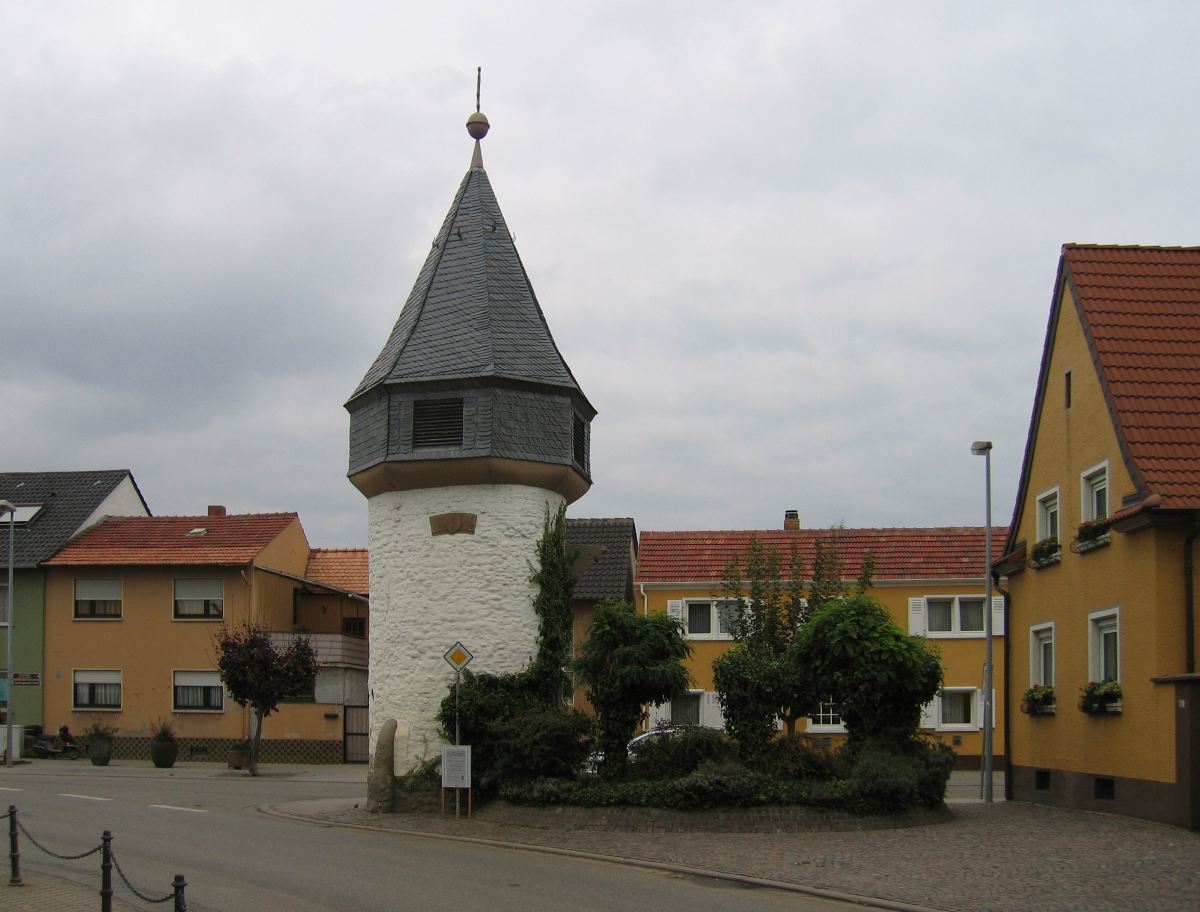 Motiv: Neutorturm in Lambsheim Fotograf: Romantiker Aufnahmedatum: 26.09.2004 Bildname: Lambsheim Neutorturm.jpg Bildgröße: 2 592 Pixel x 1 944 Pixel (1 946 885 Bytes) Lizenz: GNU Freie Dokumentationslizenz